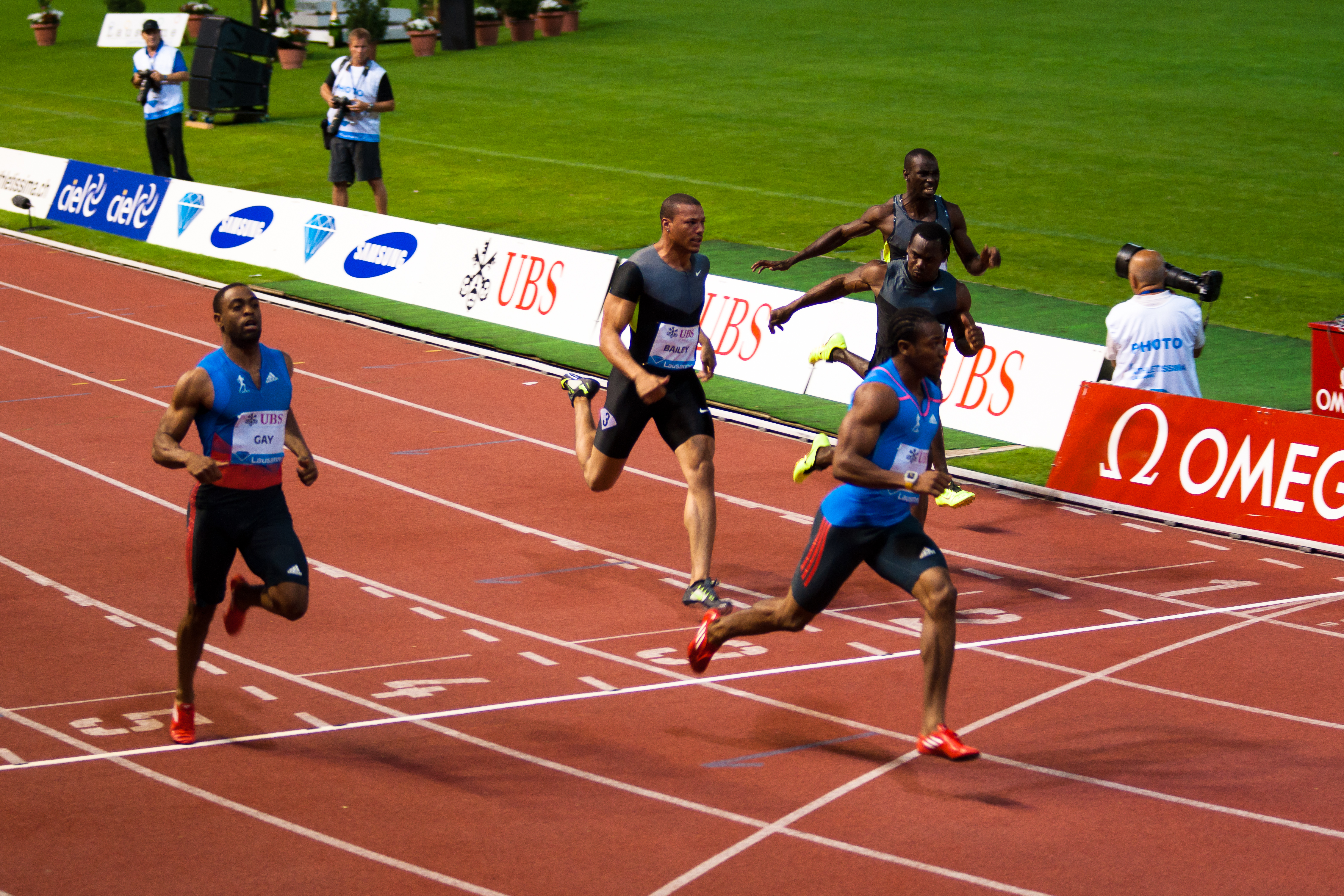 Athletissima 2012 - arrivée du 100m Hommes. Tyson Gay, Ryan Bailey, Yohan Blake, Nesta Carter, Jaysuma Saidy Ndure